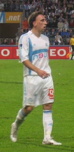 Franck Ribéry, lors du match de Ligue 1 OM-Lille le 29 octobre 2005 au Stade Vélodrome